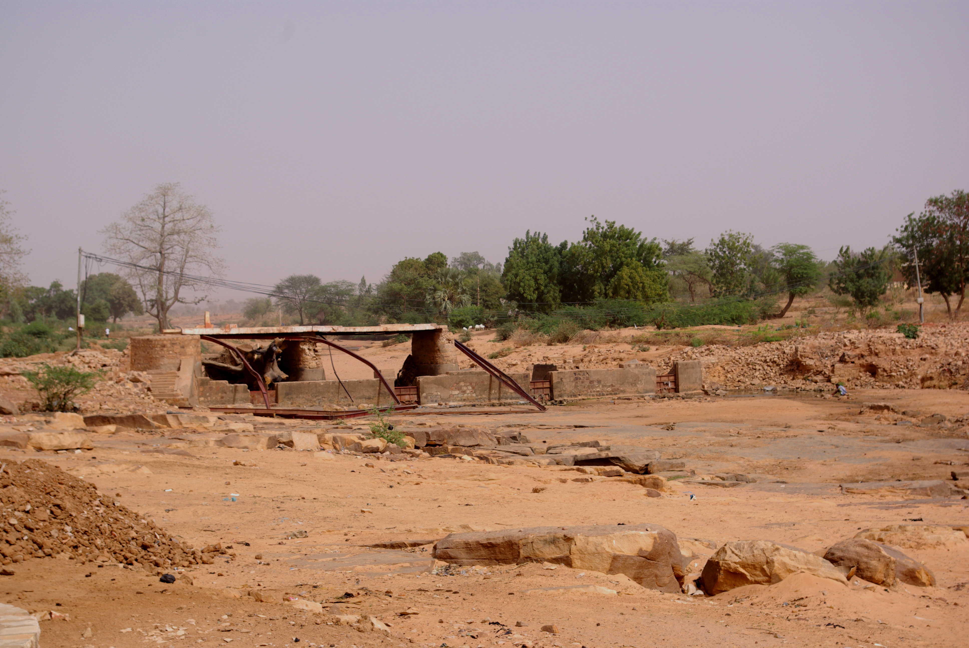 Pont sur le Yamé après la crue de 2007